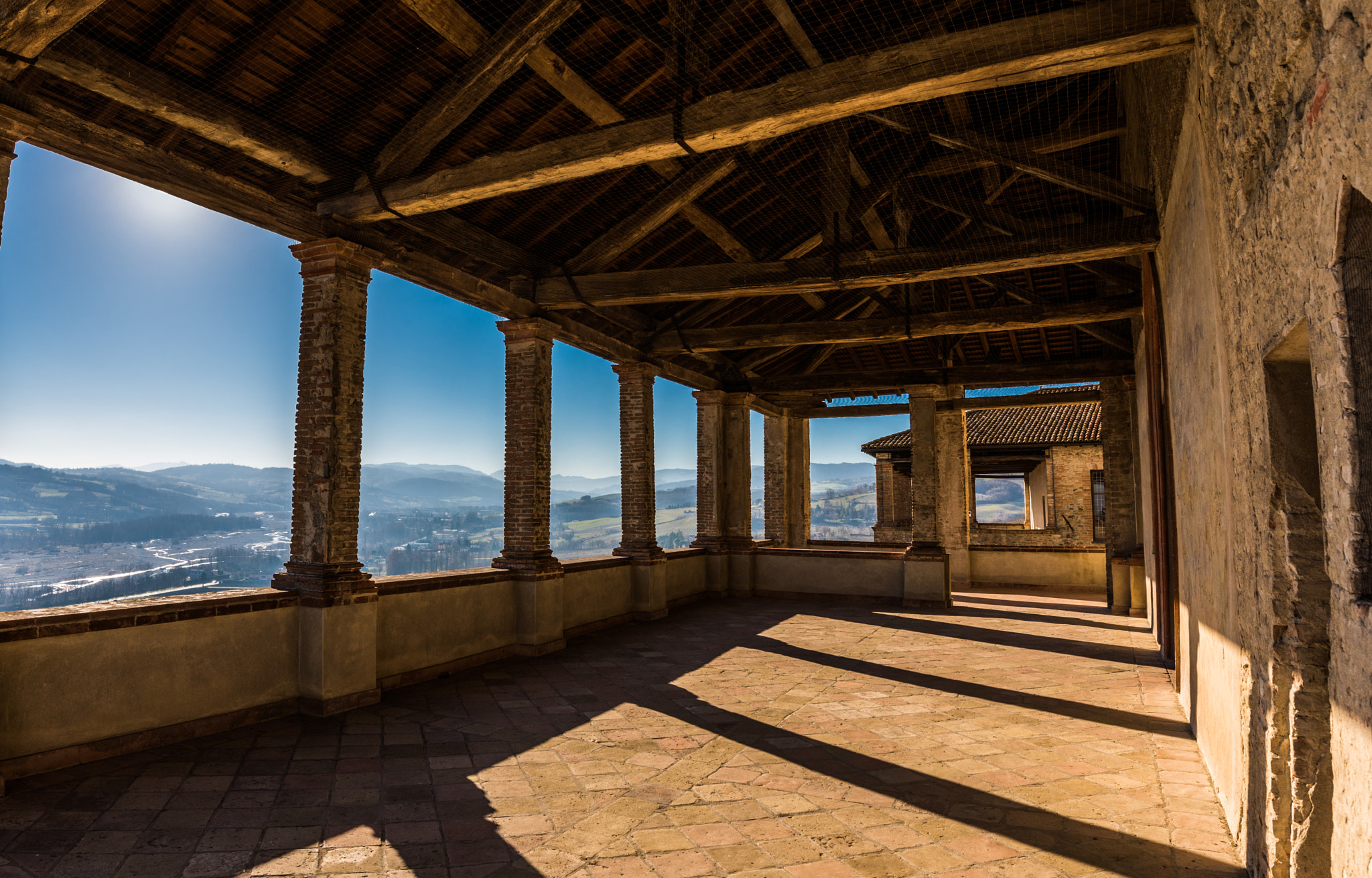 500px provided description: Dal Castello